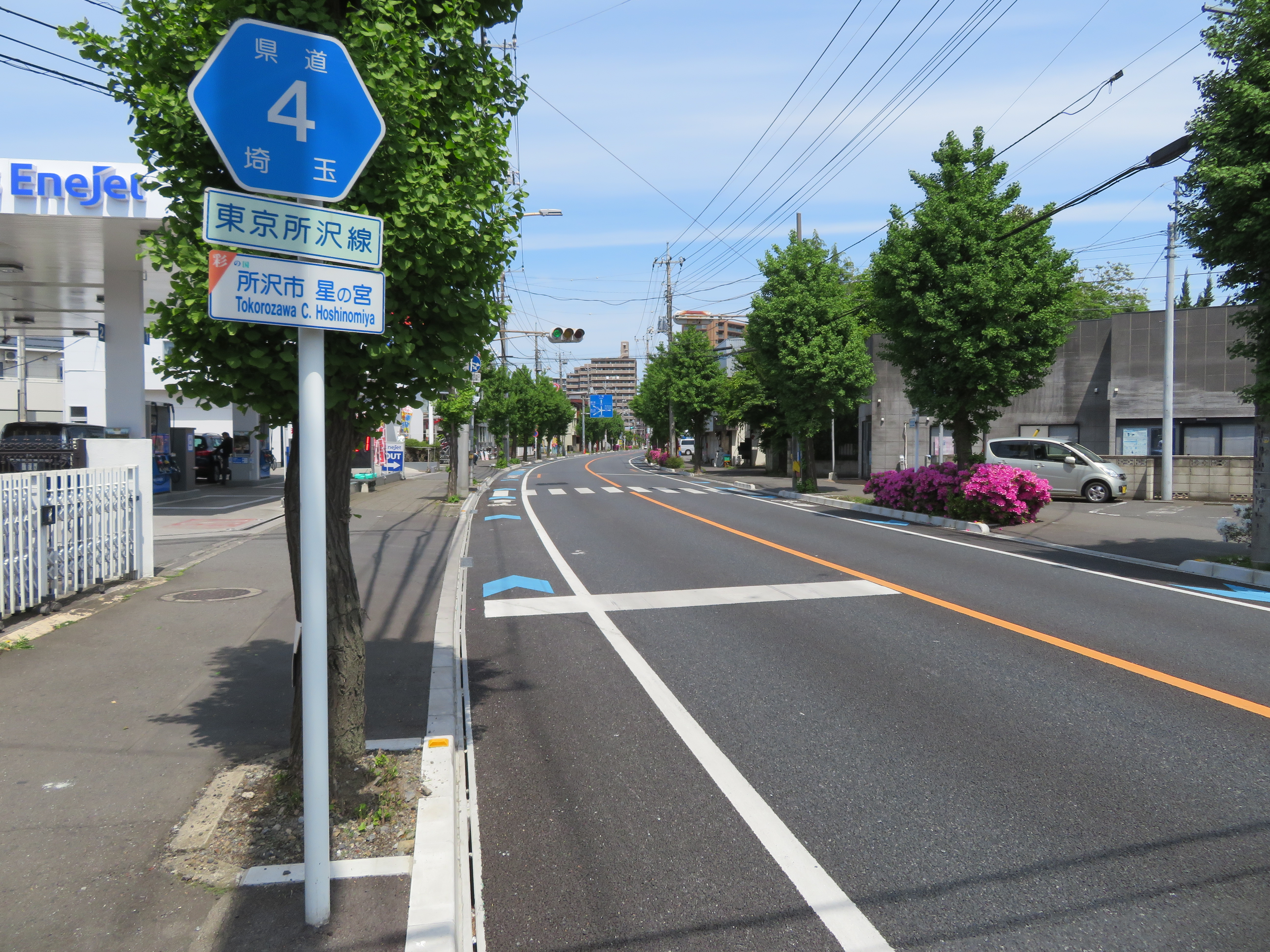 埼玉県道4号線所沢市星の宮付近（入間方面を撮影） Canon PowerShot SX720 HS